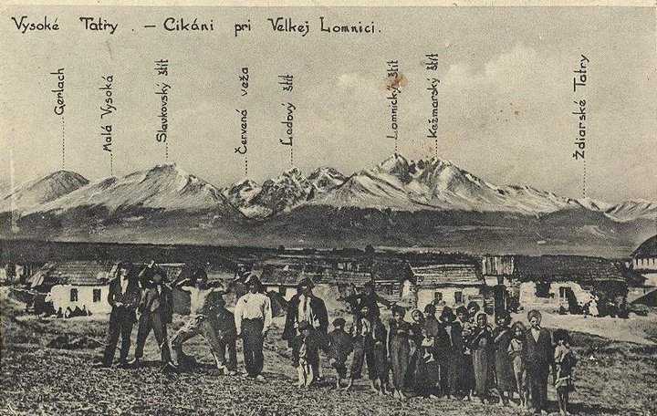 Cigáni z osady pri Veľkej Lomnici na Slovensku. Osada s modernejšími chatrčami je tam aj dnes.